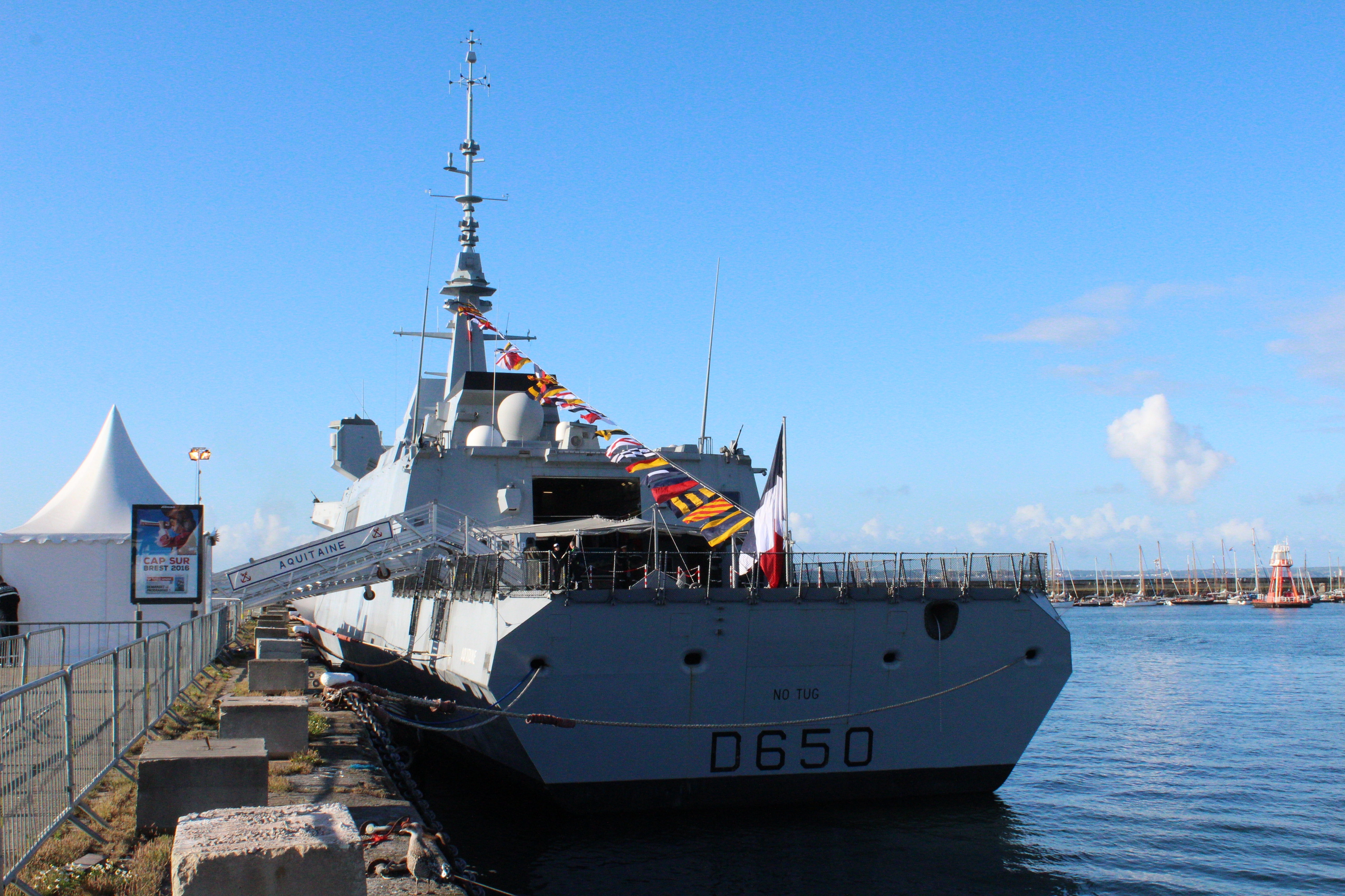 L'Aquitaine au 5ième bassin